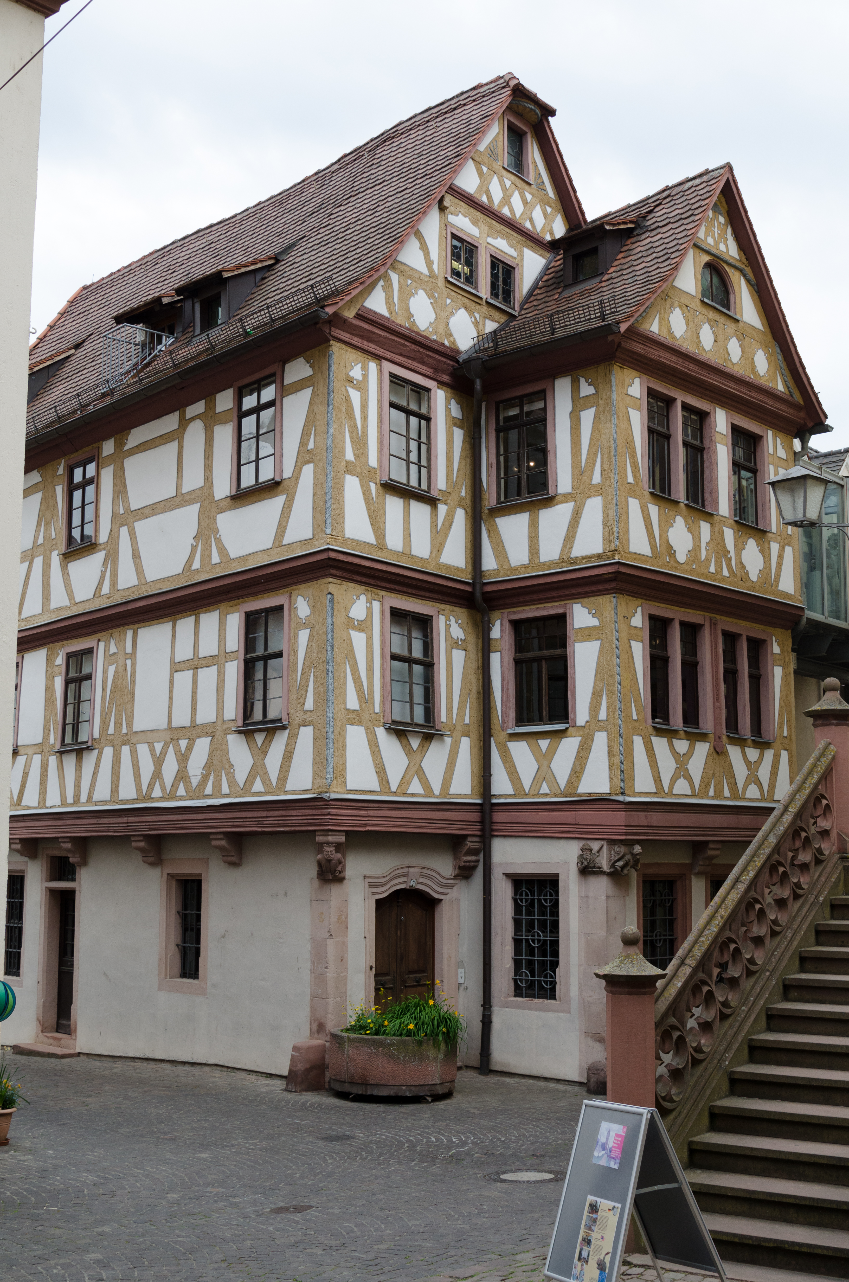 Wertheim, Rathausgasse7-019